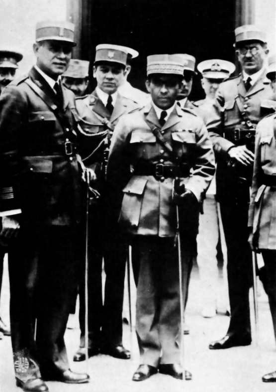 Luis M. Sánchez Cerro, presidente constitucional del Perú, hacia 1932.